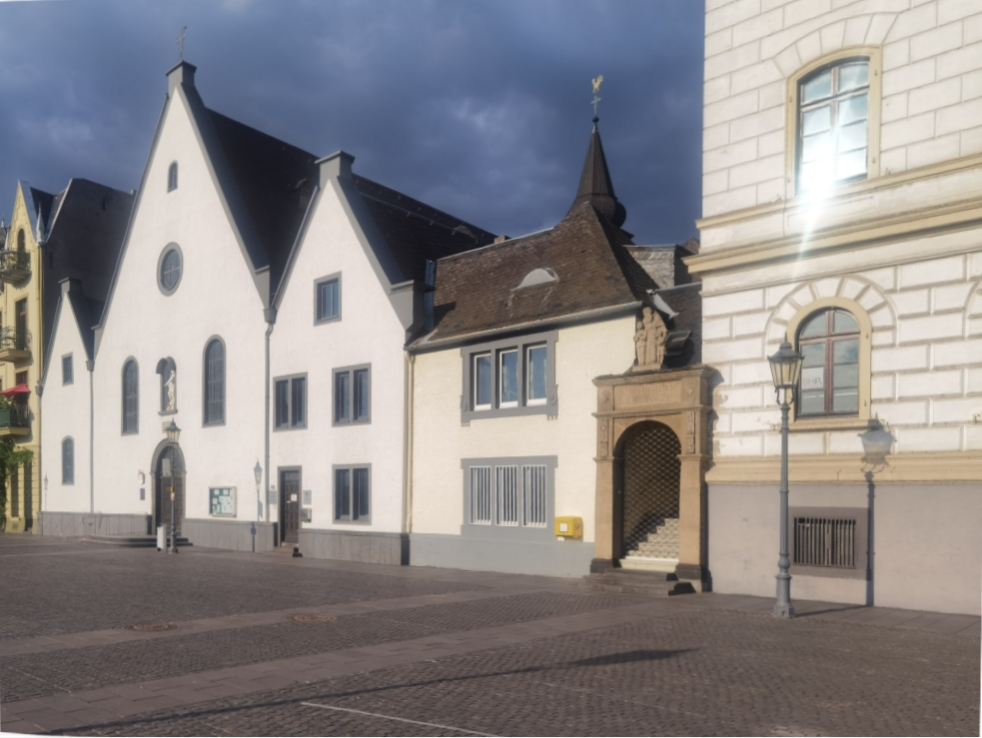 Die Kirche des Kapuzinerklosters erstrahlt in diesem Jahr im neuen Glanz des Fassadenanstriches und der Renovierung der Statue über dem Eingangsportal.